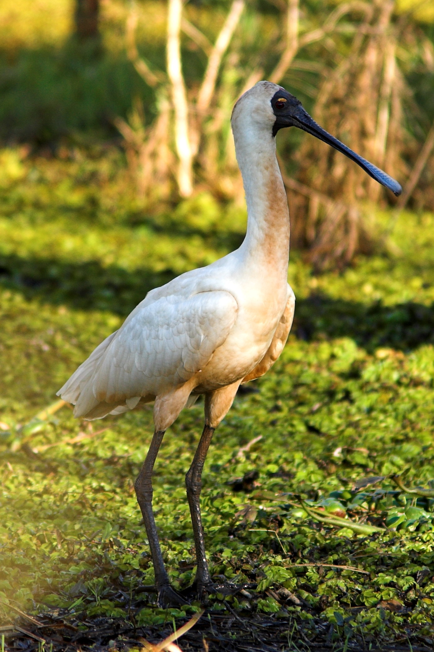 Royal Spoonbill, Platalea regia.